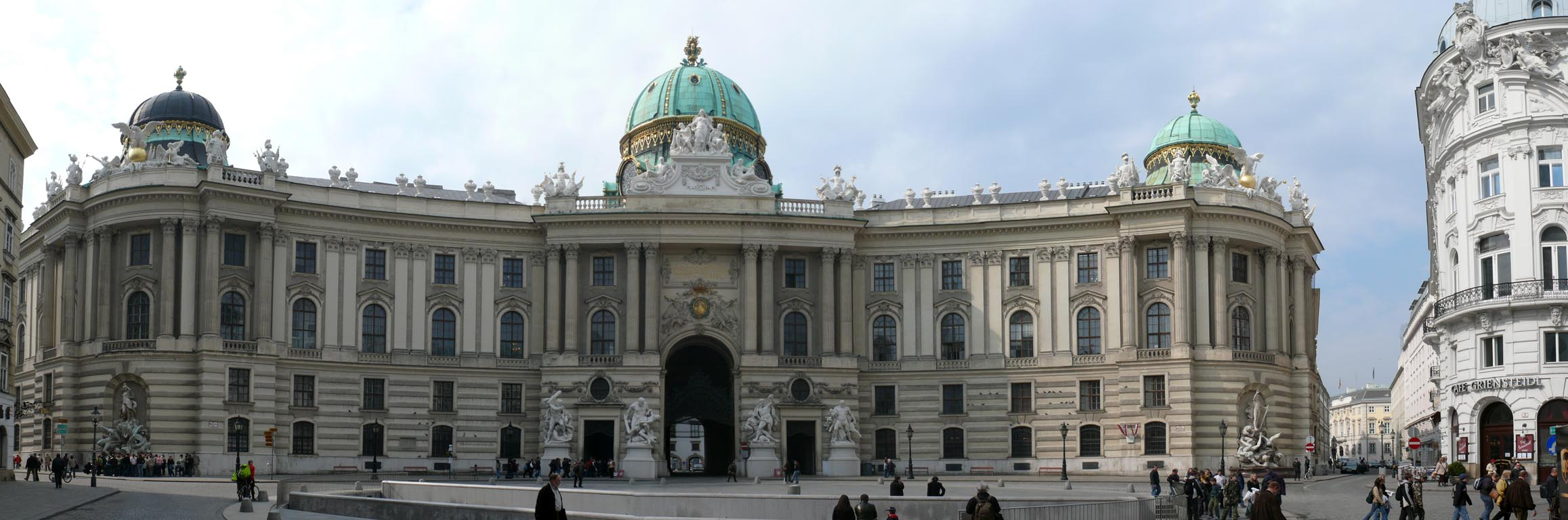 Hofburg, Michaelertrakt - panorama